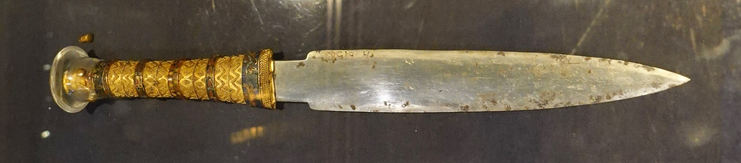 Eisendolch aus dem Grab des Tutanchamun, gefunden zwischen den Mumienbinden am rechten Oberschenkel des Königs, ausgestellt im Ägyptischen Museum in Kairo, Ägypten